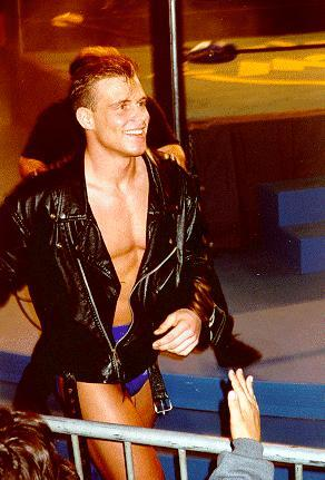 Alex Wright, ex-luchador de la WCW